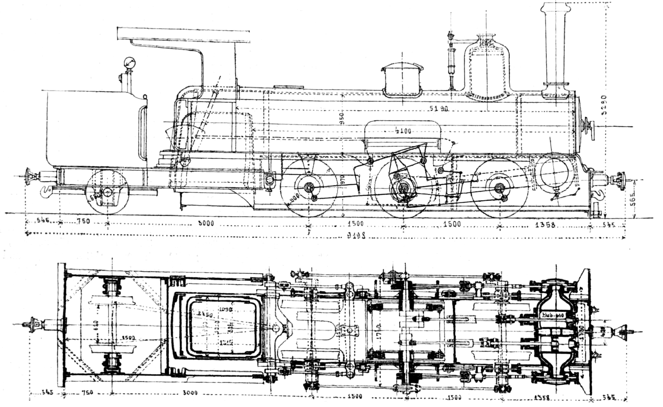 Auf- und Grundriss der IIIa4 der Bosnisch-Herzegowinischen Staatsbahnen (BHStB)